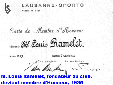 LS